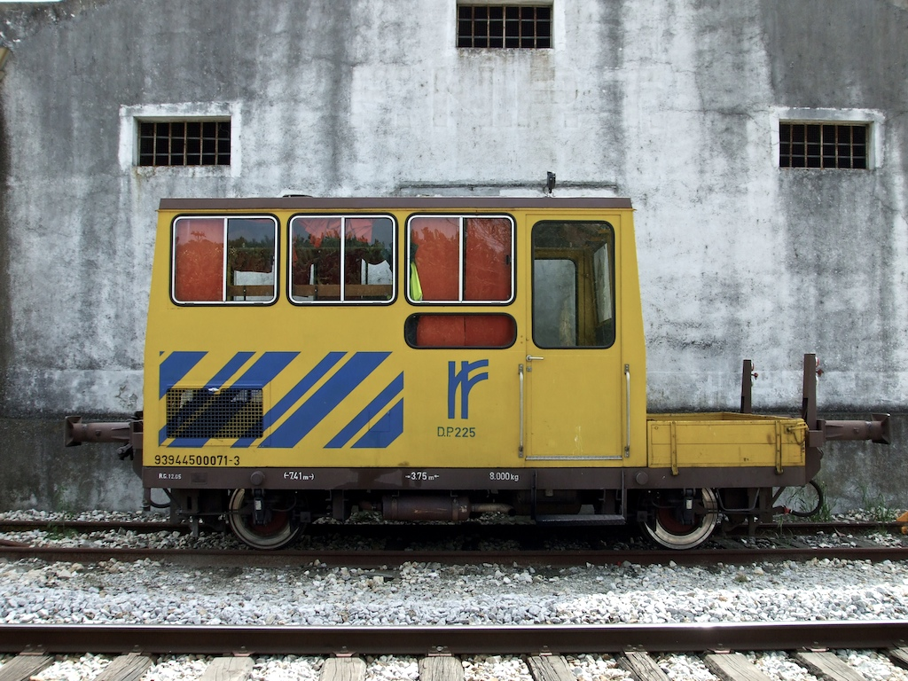 Tipo: Dresine de Transporte de Pessoal Local: Estação de Alcácer do Sal [Linha do Sul, PK 78] Data e hora: 3 de Maio de 2008 [15h29] Material: REFER DP 225 [93 94 450 0 071-3]